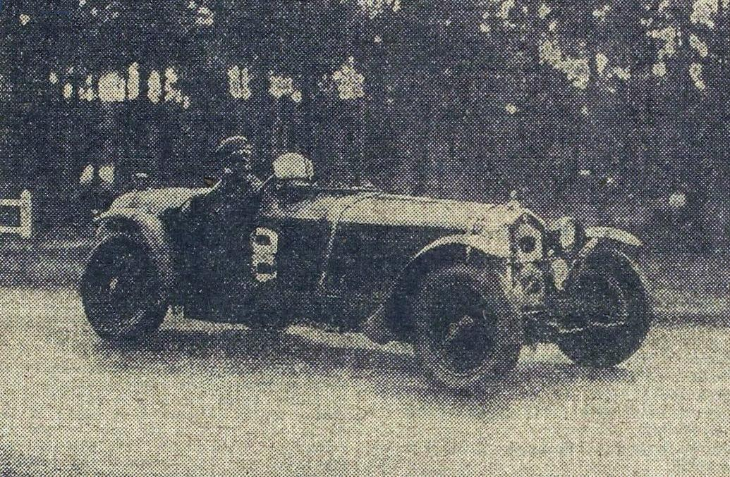 Luigi Chinetti, deuxième des 24 Heures du Mans 1933.